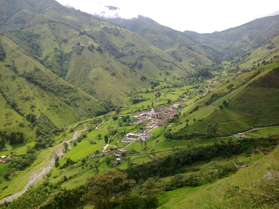 Panorámica del corregimiento y accidentes geográficos